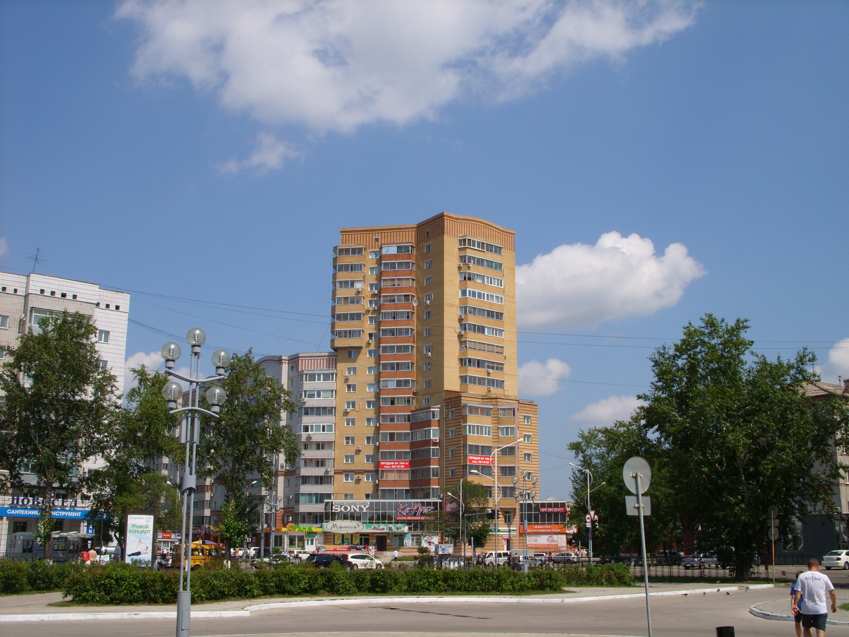 Амурская область, Россия. Снимки августа 2011 г.